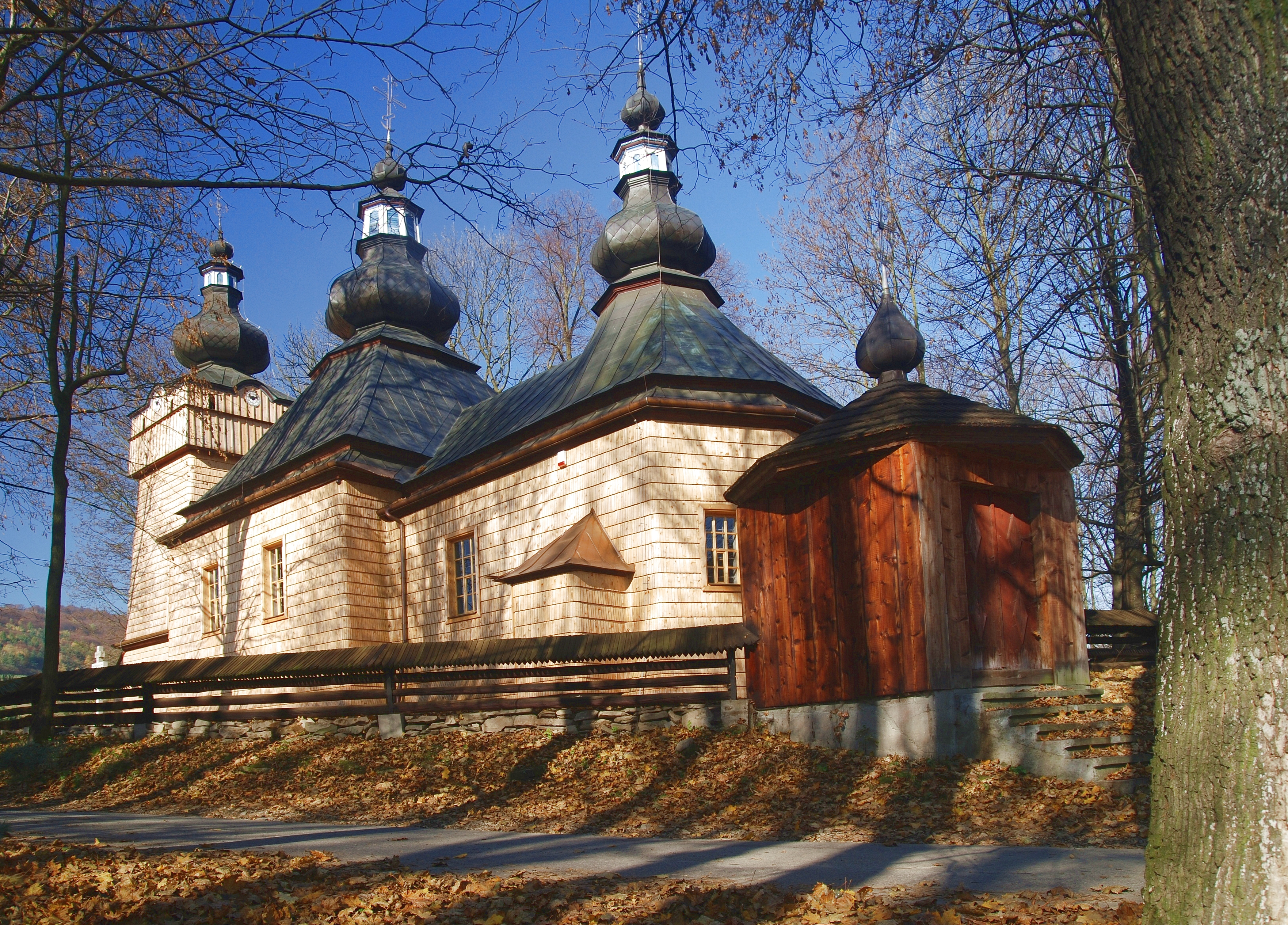 wieś Hańczowa